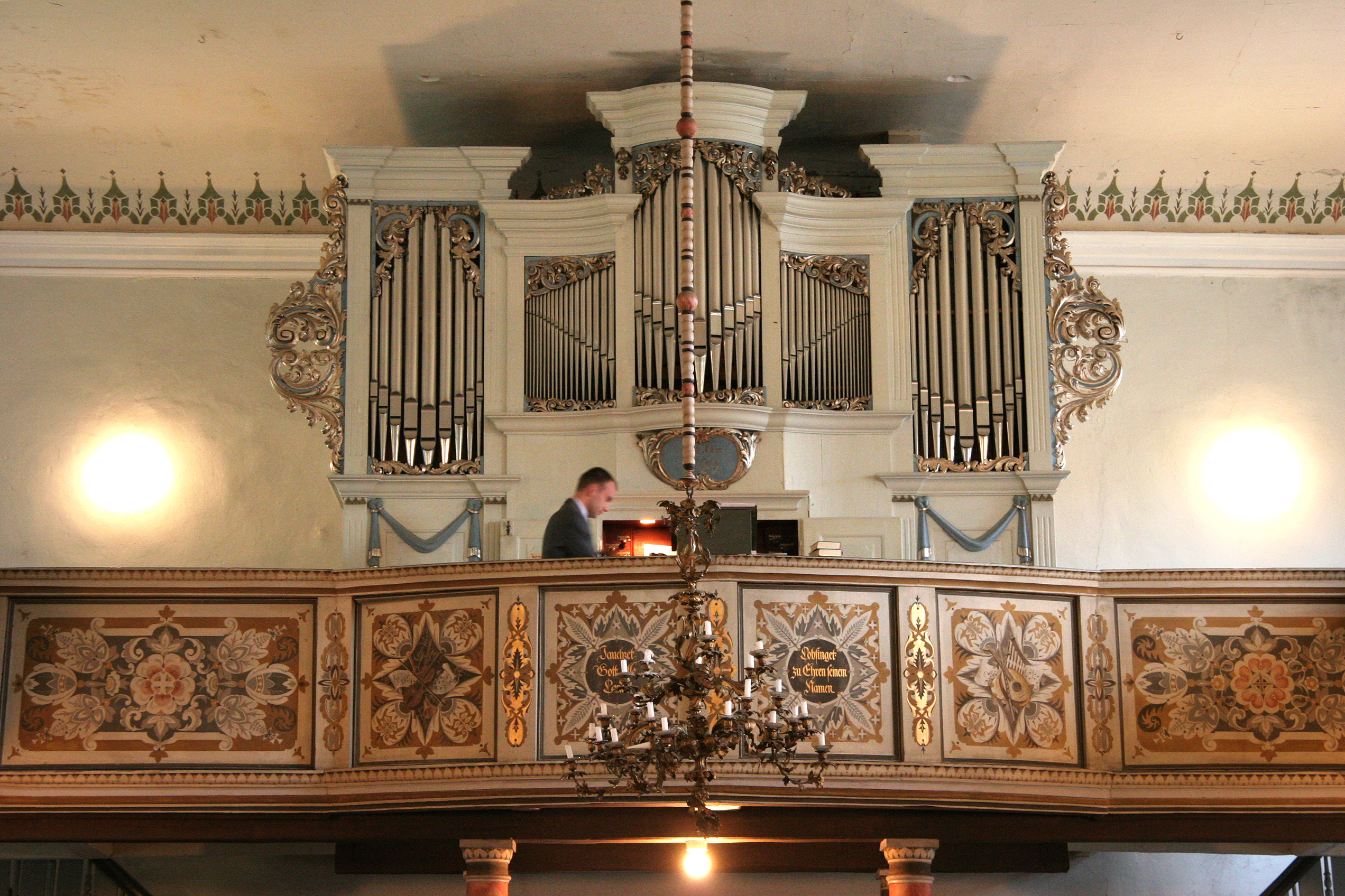 Wagner-Orgel der Kirche Pritzerbe